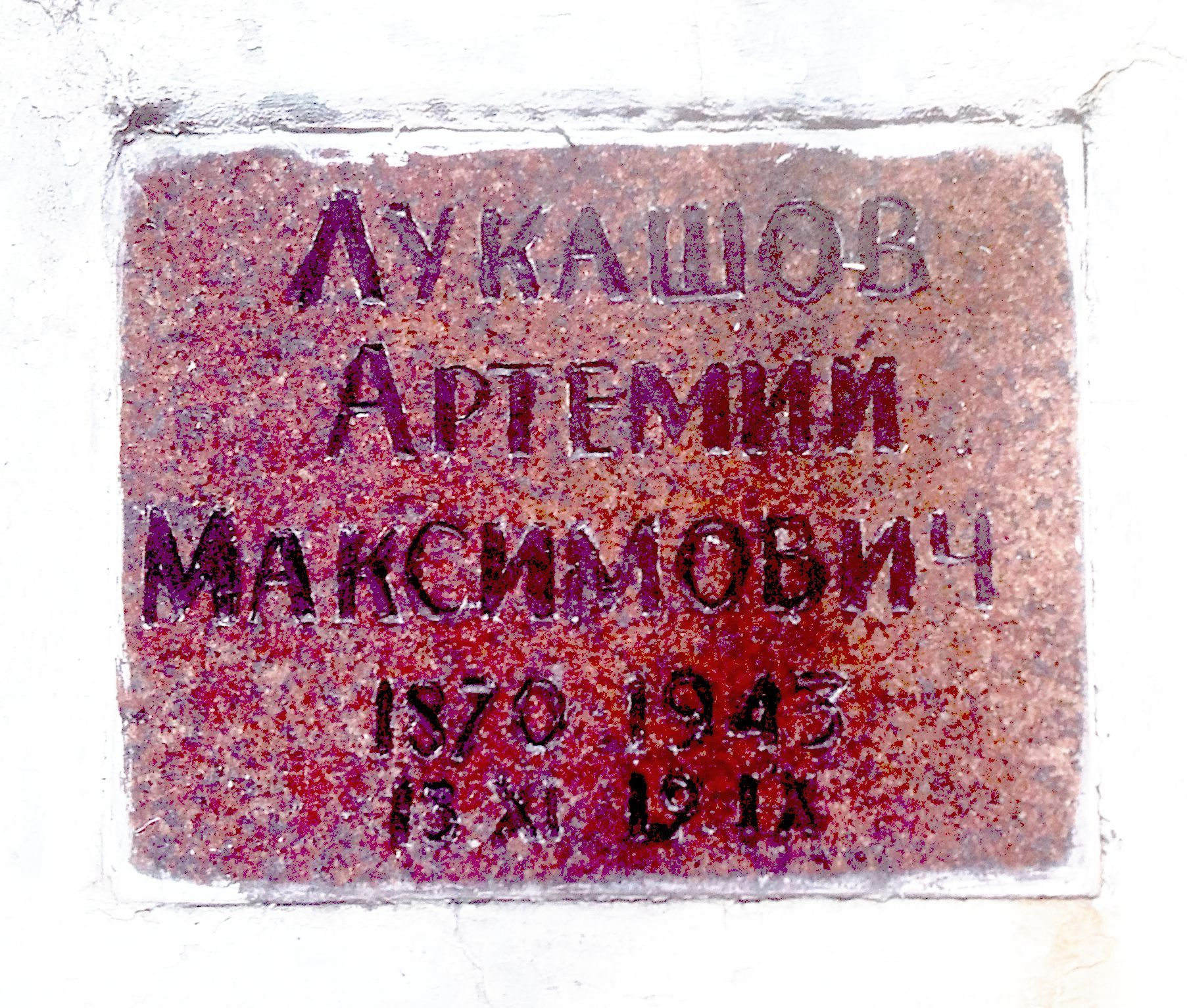 Памятная доска на памятнике Лукашову А. М.